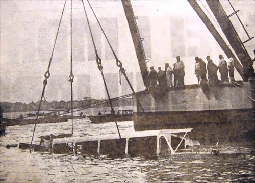 Motoscafo acnil affondato 11-9-1970 tornado venezia